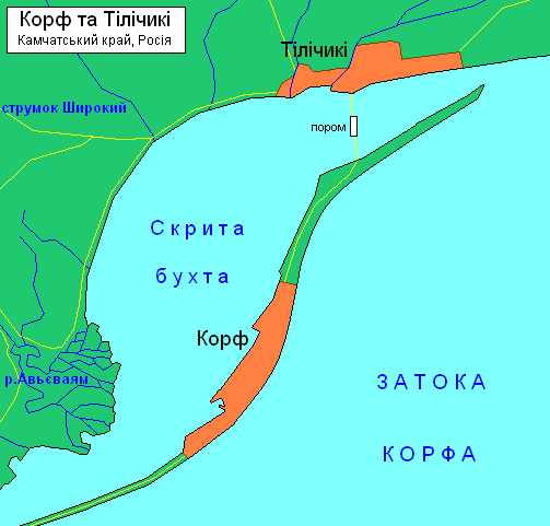 Корф-Тілічикі. Мапа регіону